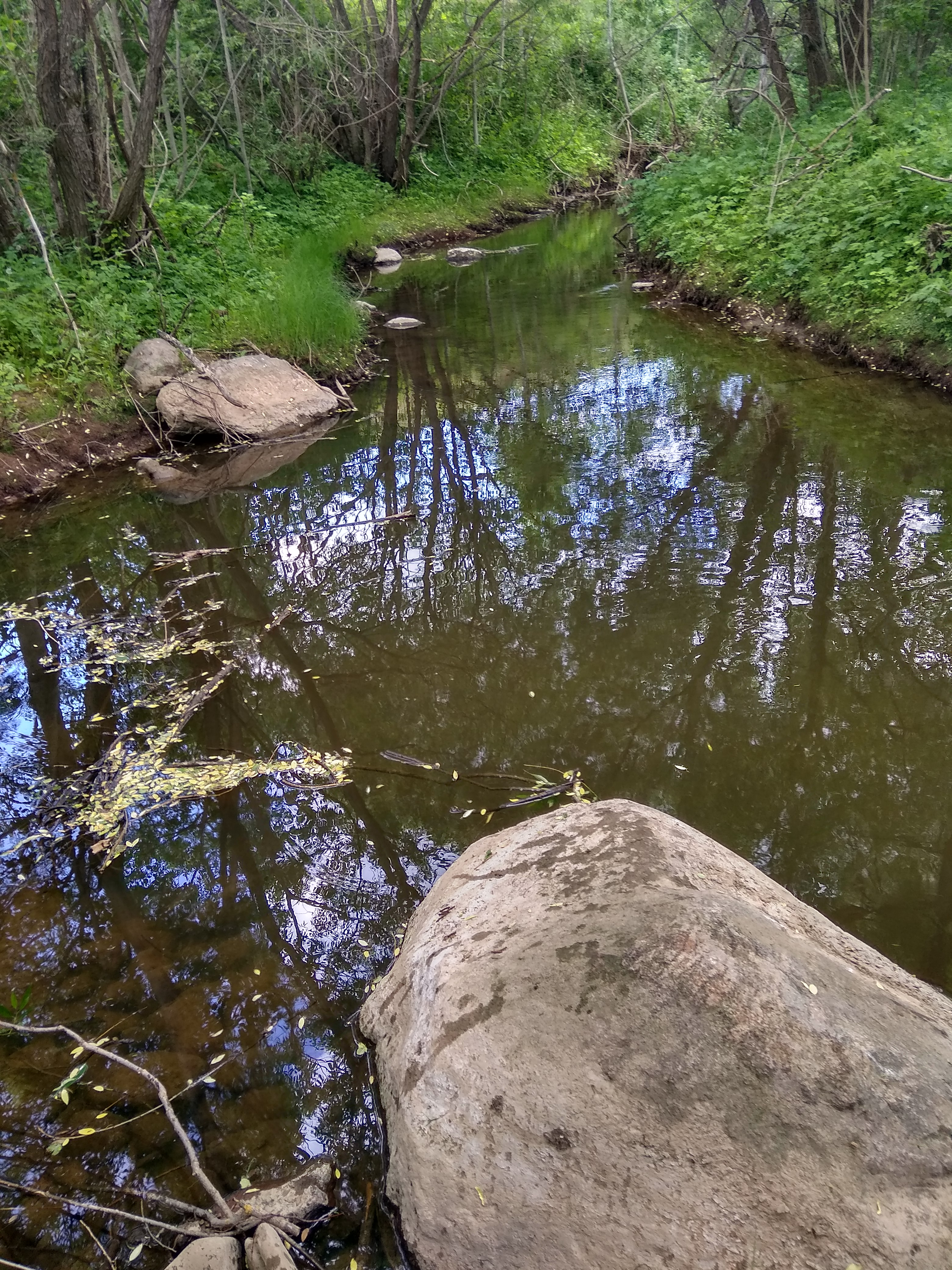 Река Рыкуша Тутаевский р-н предустьевой участок реки Июнь 2019 год.